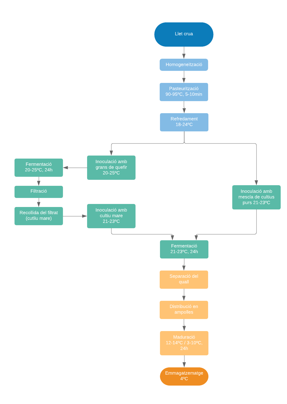 Procés esquemàtic de producció industrial del quefir de llet